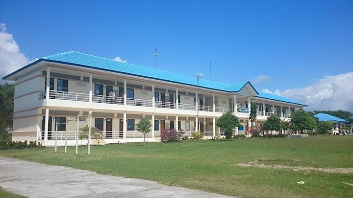 Ini adalah lambang dan gedung Sekolah SMAN Unggul Tunas Bangsa Abdya